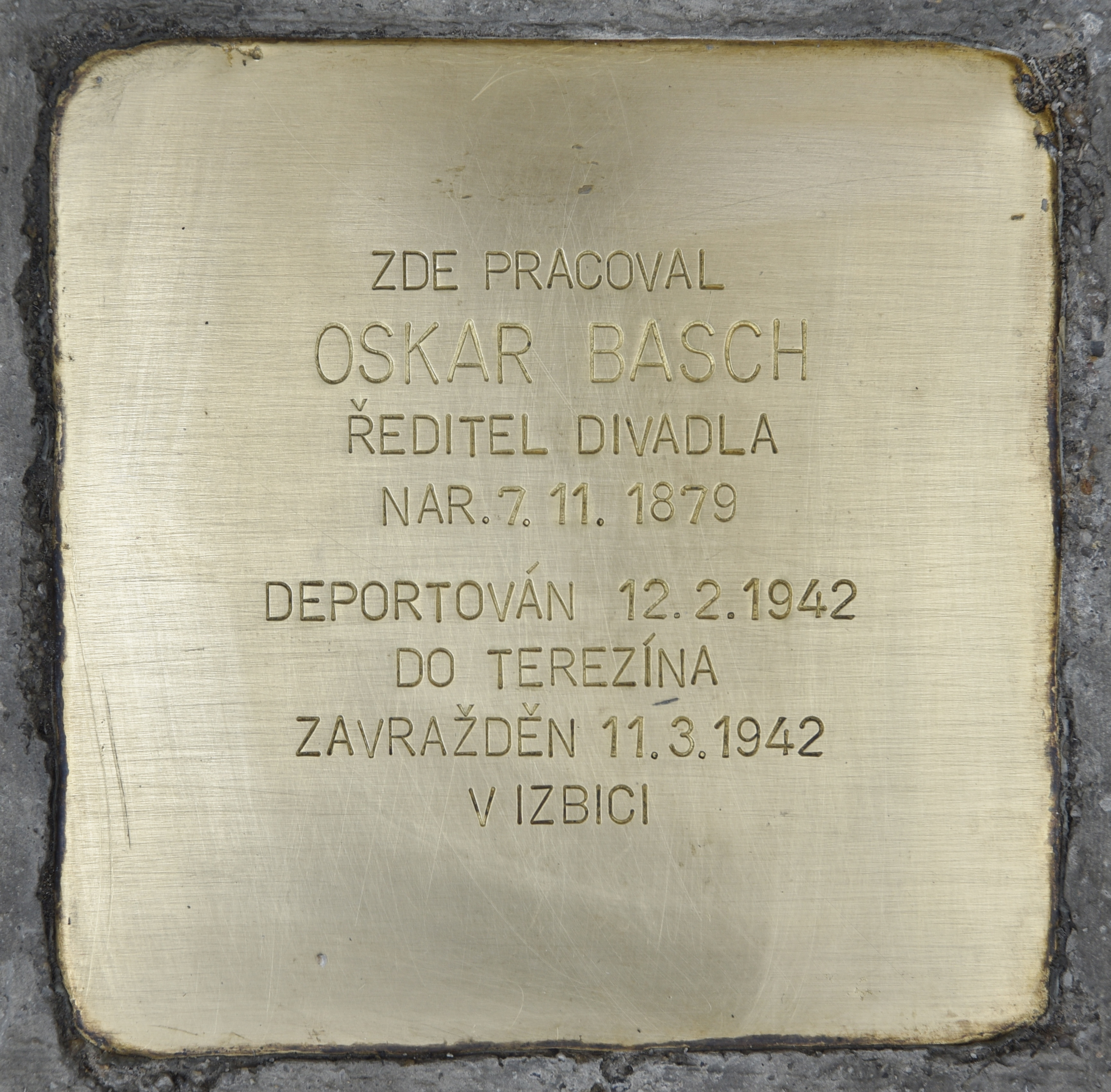 Stolperstein für Oskar Basch